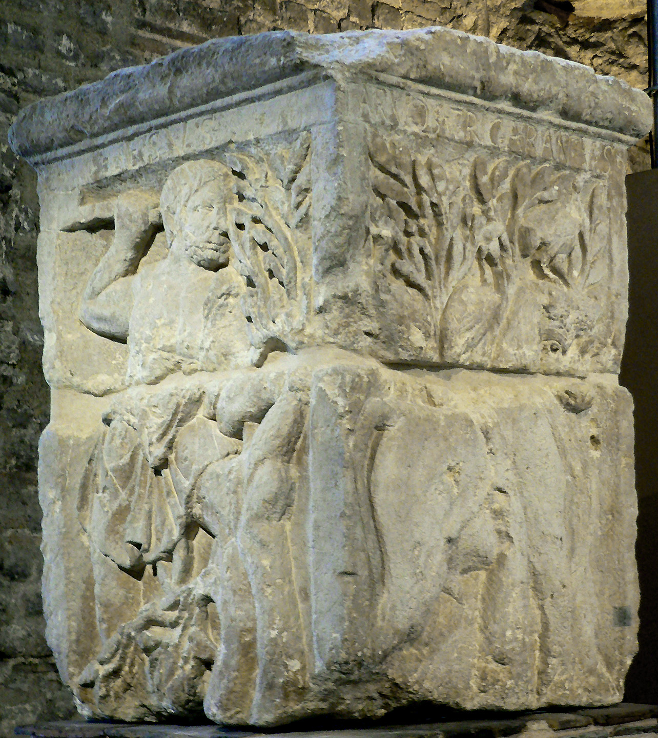 Pilier des Nautes Esus / Taureau Musée de Cluny - Musée National du Moyen Age Source : Clio20